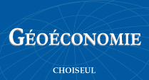 Logo de la revue Géoéconomie